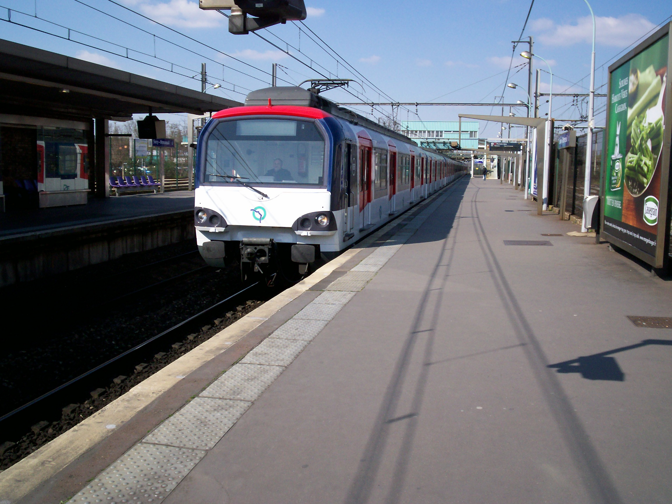 Vue d'un train en gare de Sucy